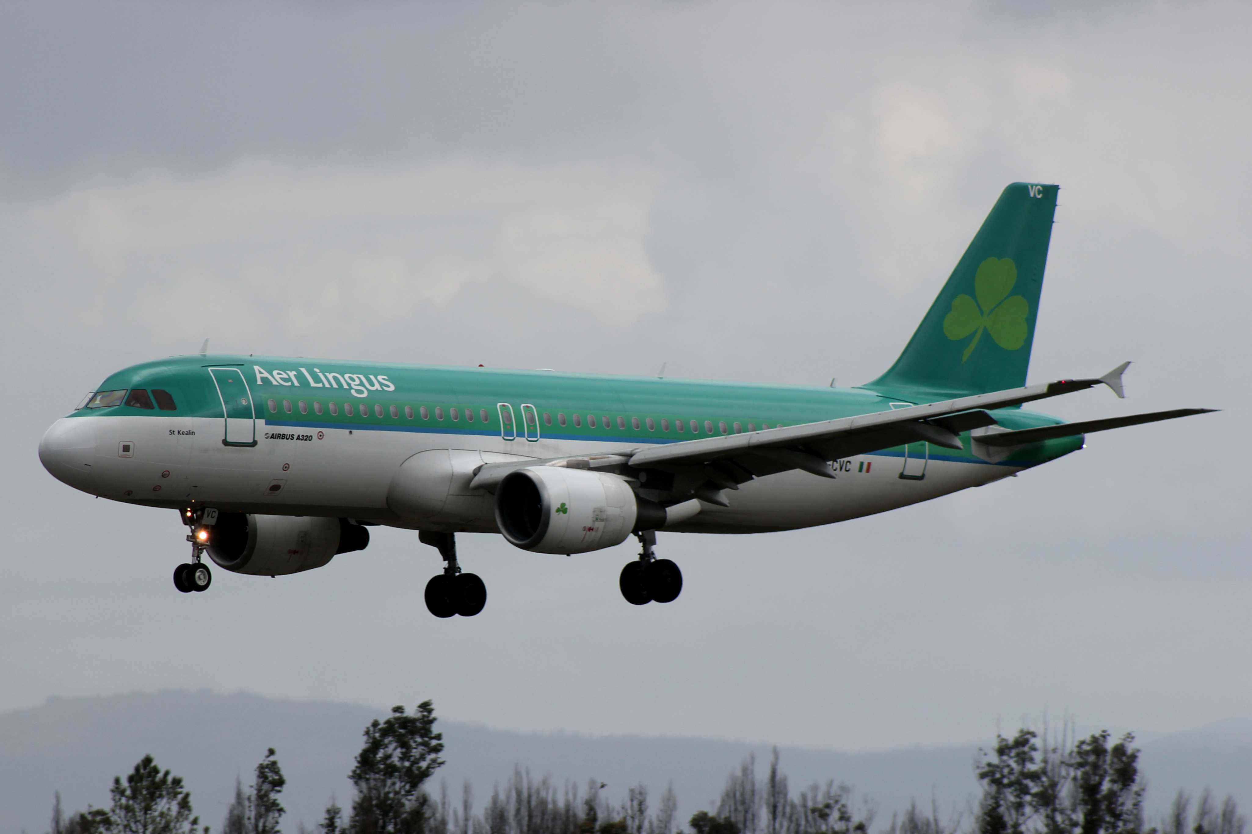 Airbus A320 de Aer Lingus aterrando no aeroporto de Santiago de Copostela.